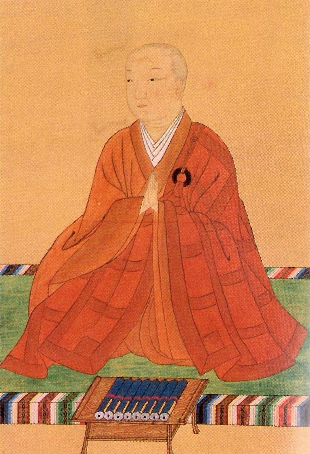 光子内親王の自画像。